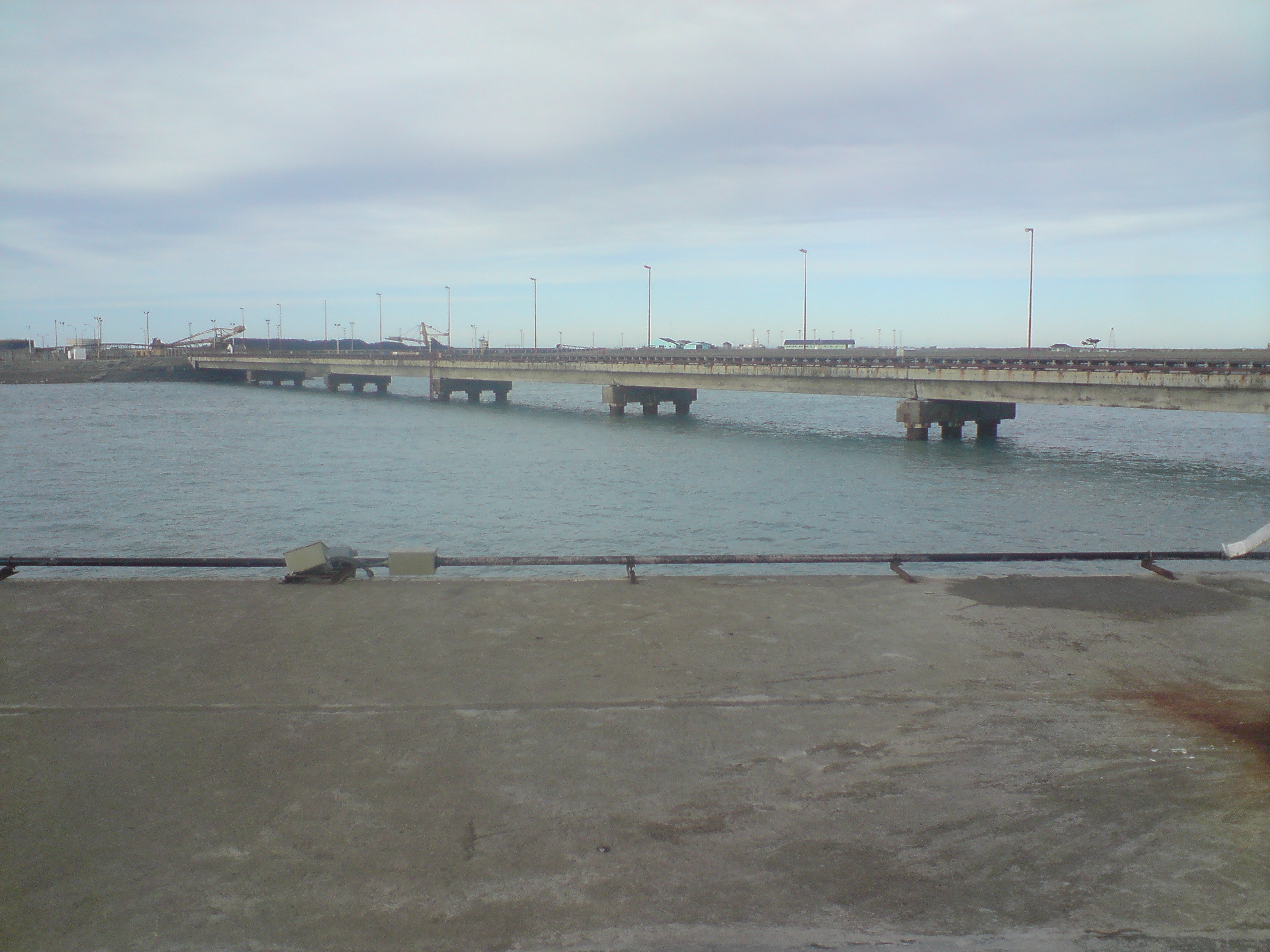 VISTA PANORAMICA DEL MUELLE Y DEL COMPLEJO FERROPORTUARIO EN PUNTA LOYOLA